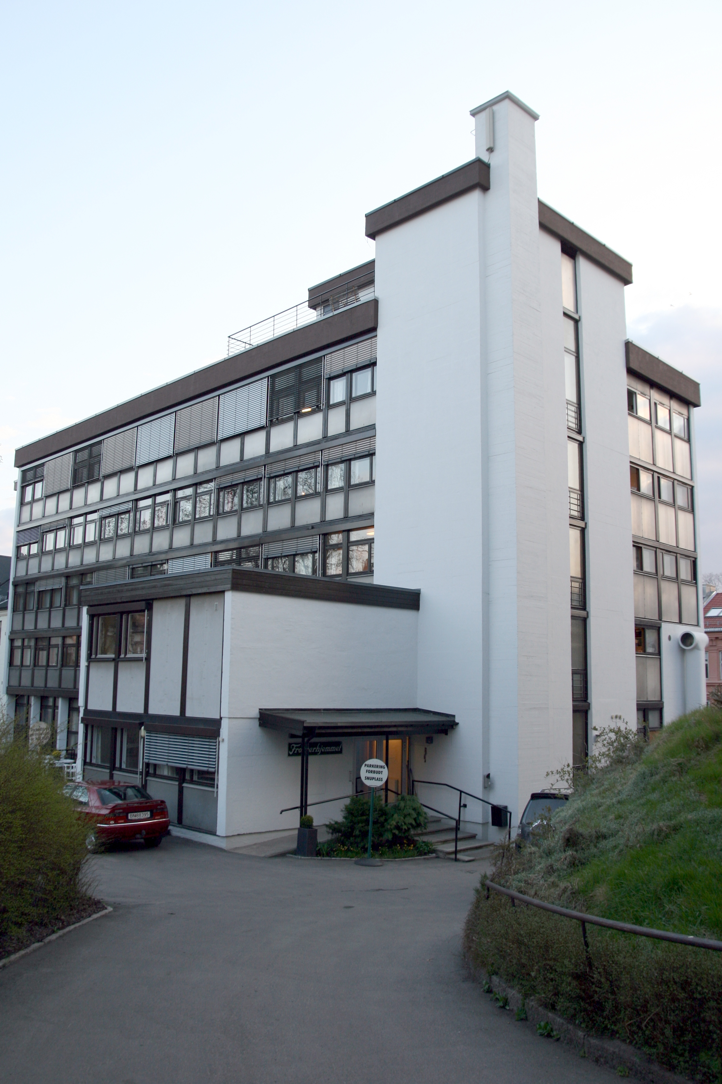 Erling Skjalgssons gate 25 på Frogner i Oslo. Bygingen huser Frognerhjemmet (Frogner menighets hjem), et sykehjem og dagsenter.